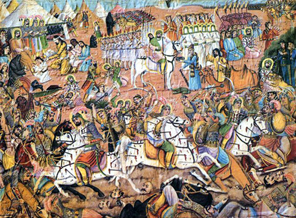 Scène de la bataille de Karbalâ, par Mohammad Modabber, deuxième fondateur de l’école picturale ghahveh-khâneh